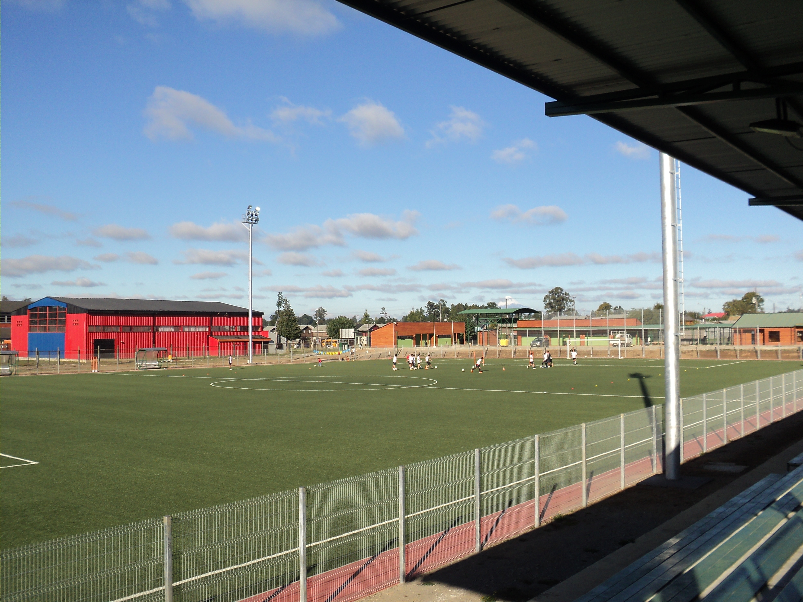 Estadio Centenario de Purranque, Región Los Lagos, Chile.